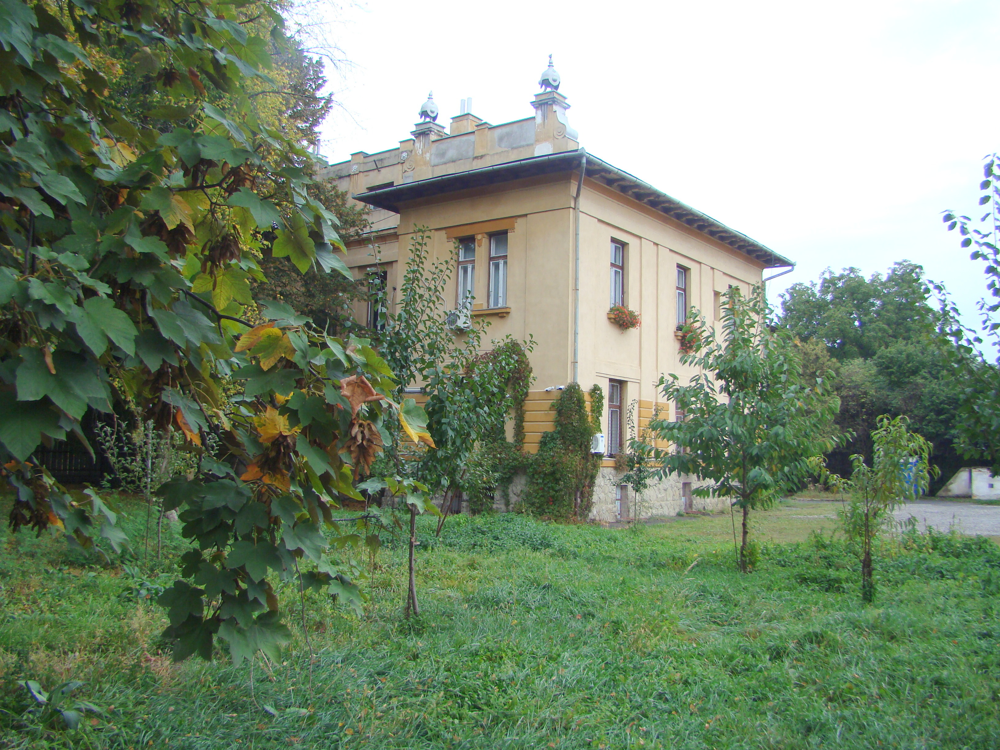 Ansamblul „Fabrica de Tutun”, municipiul Sfântu Gheorghe, str. Kós Károly 21-25 1902 - 1910